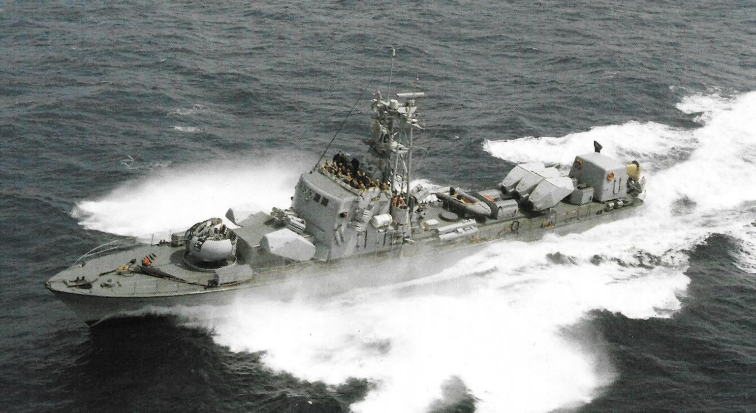 ספינת סער 2 נגד צוללות